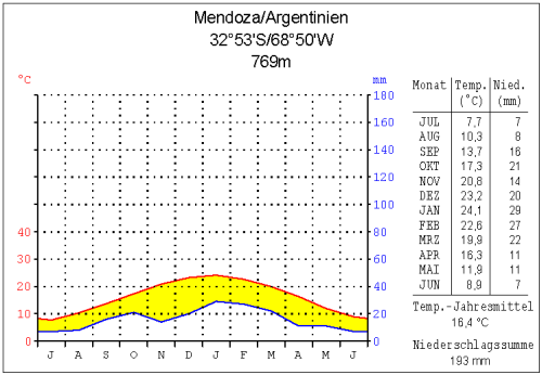 Klimadiagramm Mendoza (selbst erstellt; GNU-FDL)